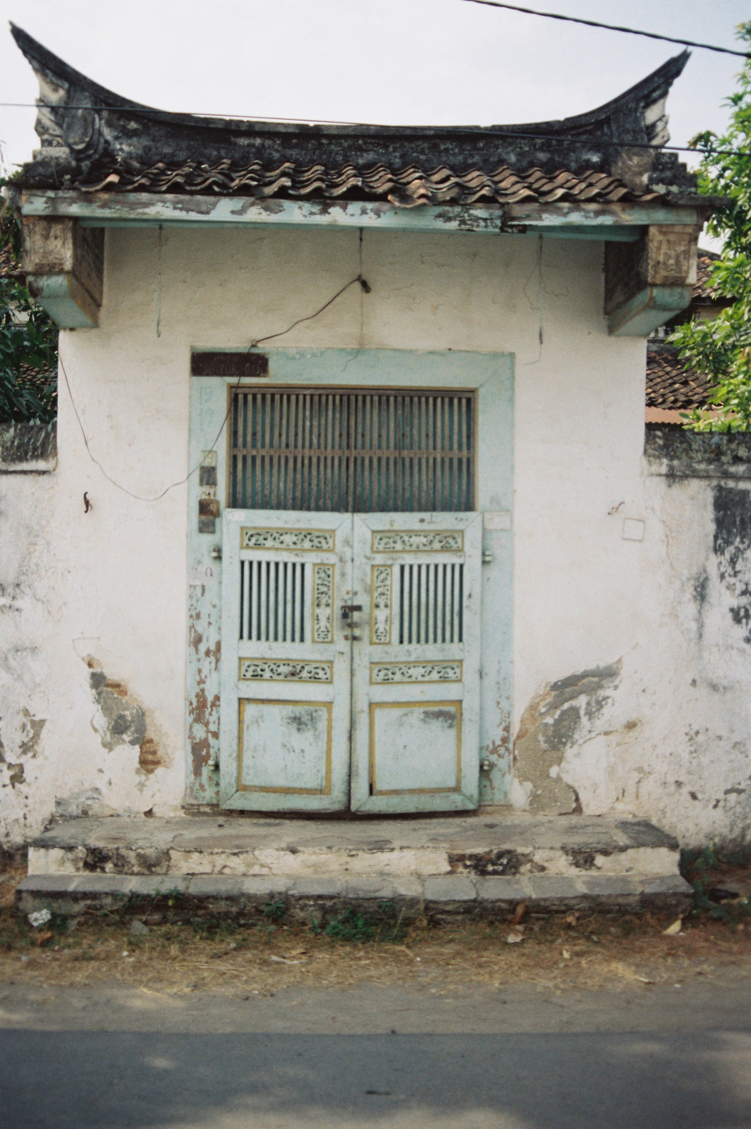 Salah satu ciri khas kota Lasem dan merupakan sisa sejarah yang menjadi salah satu daya tarik kota Lasem.